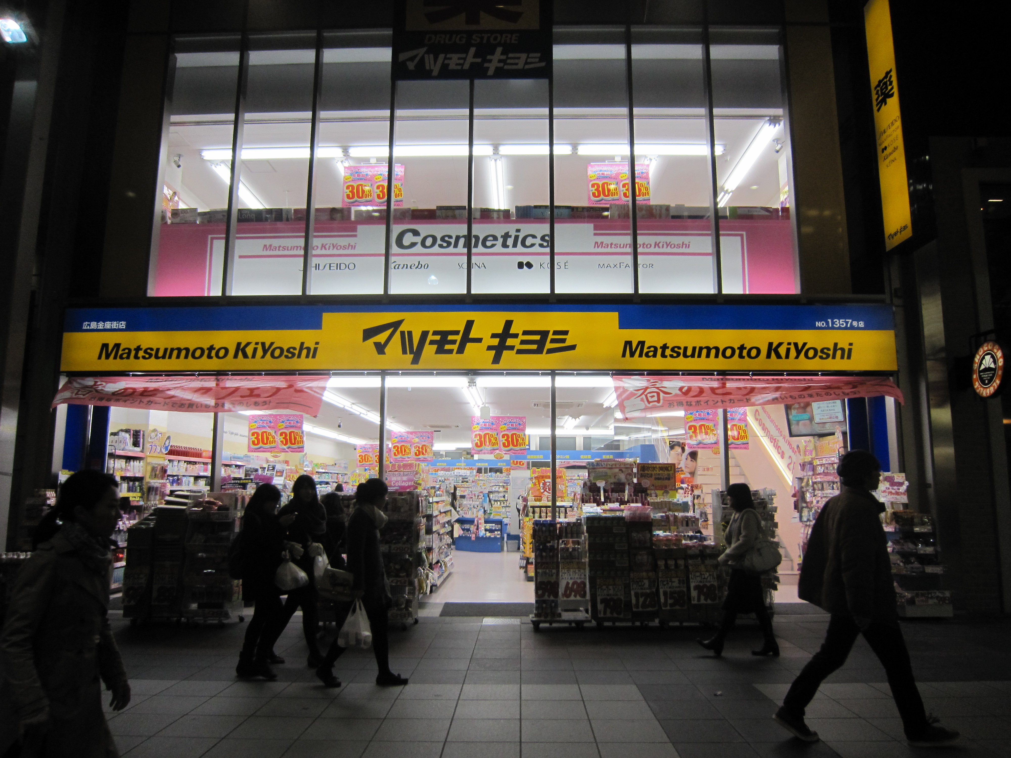 広島市中心部の都市型店舗。